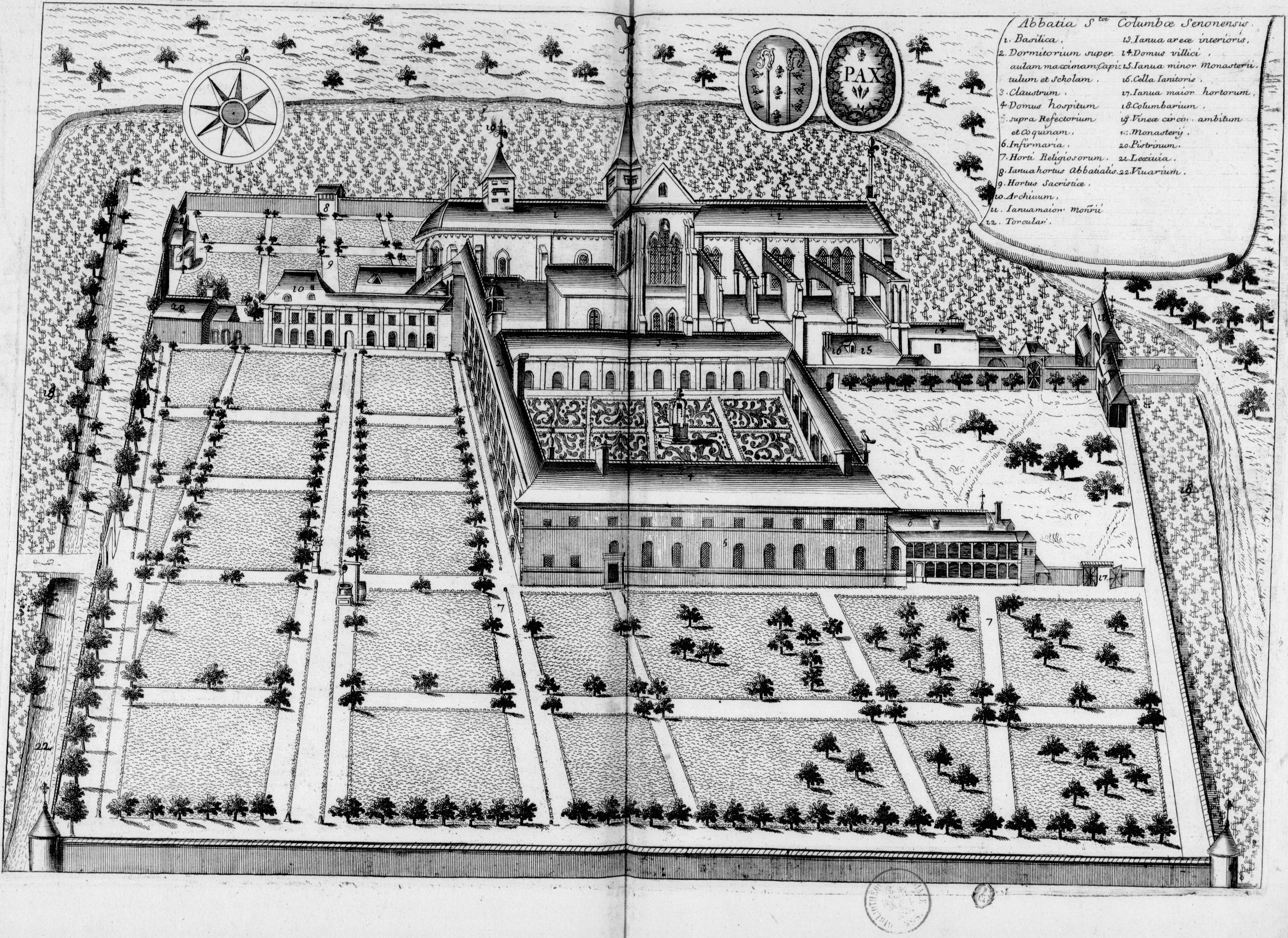 Planche gravée du 17ème siècle représentant l'abbaye Sainte-Colombe de Sens, en France, dans le livre Monasticon Gallicanum.